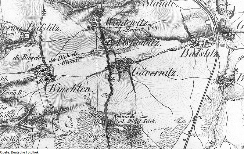 Original image description from the Deutsche Fotothek Priestewitz-Gävernitz. Oberreit, Sect. Großenhain, 1841/43